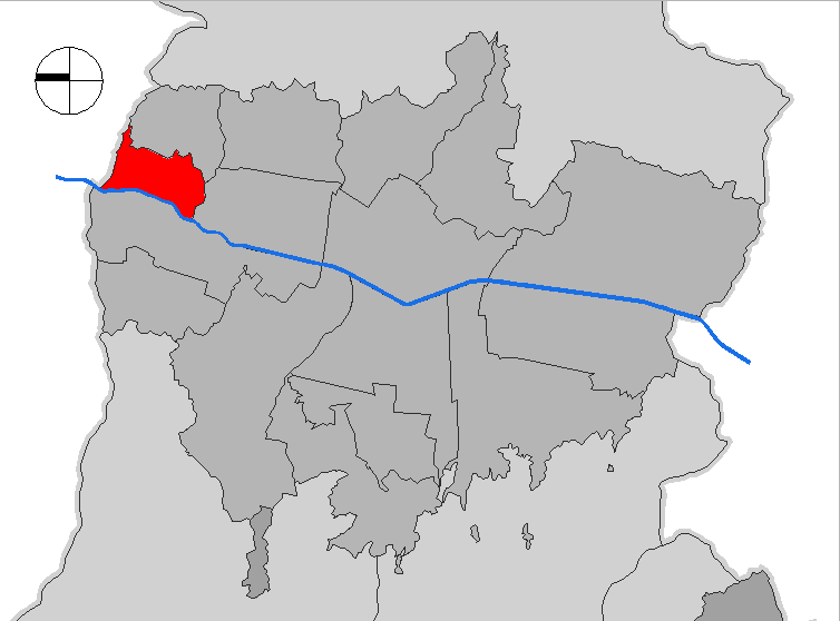 mapa de la comuna Santa Cruz. Medellín, Colombia.